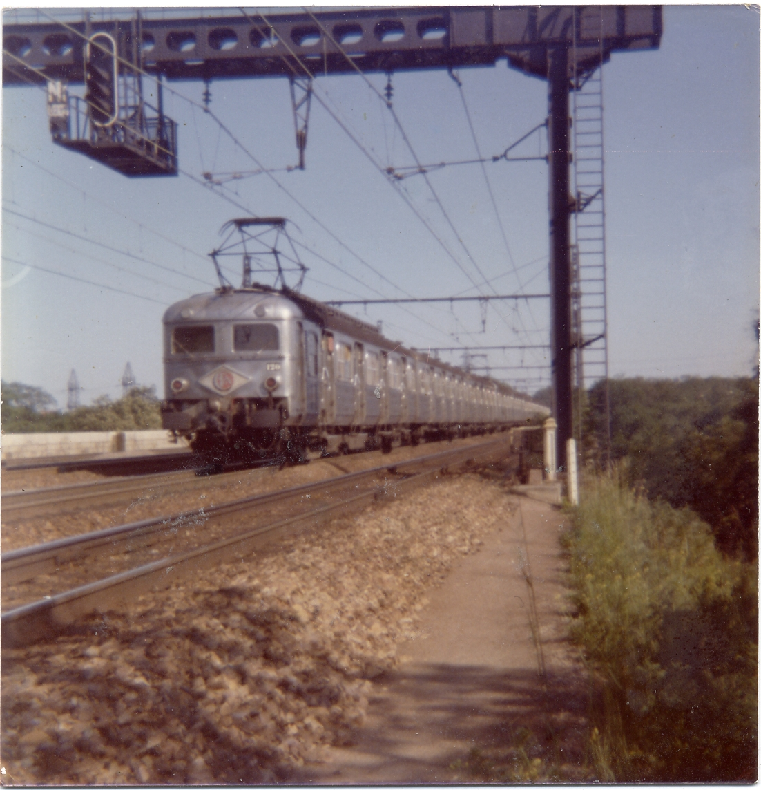 Une Z 5100 à 12 voitures sur le viaduc de Brunoy. La Z 5120 de queue n'a pas encore passé en GRG.